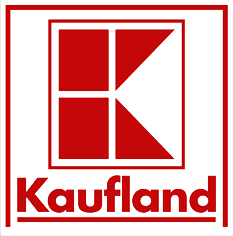 neues Kaufland-Logo